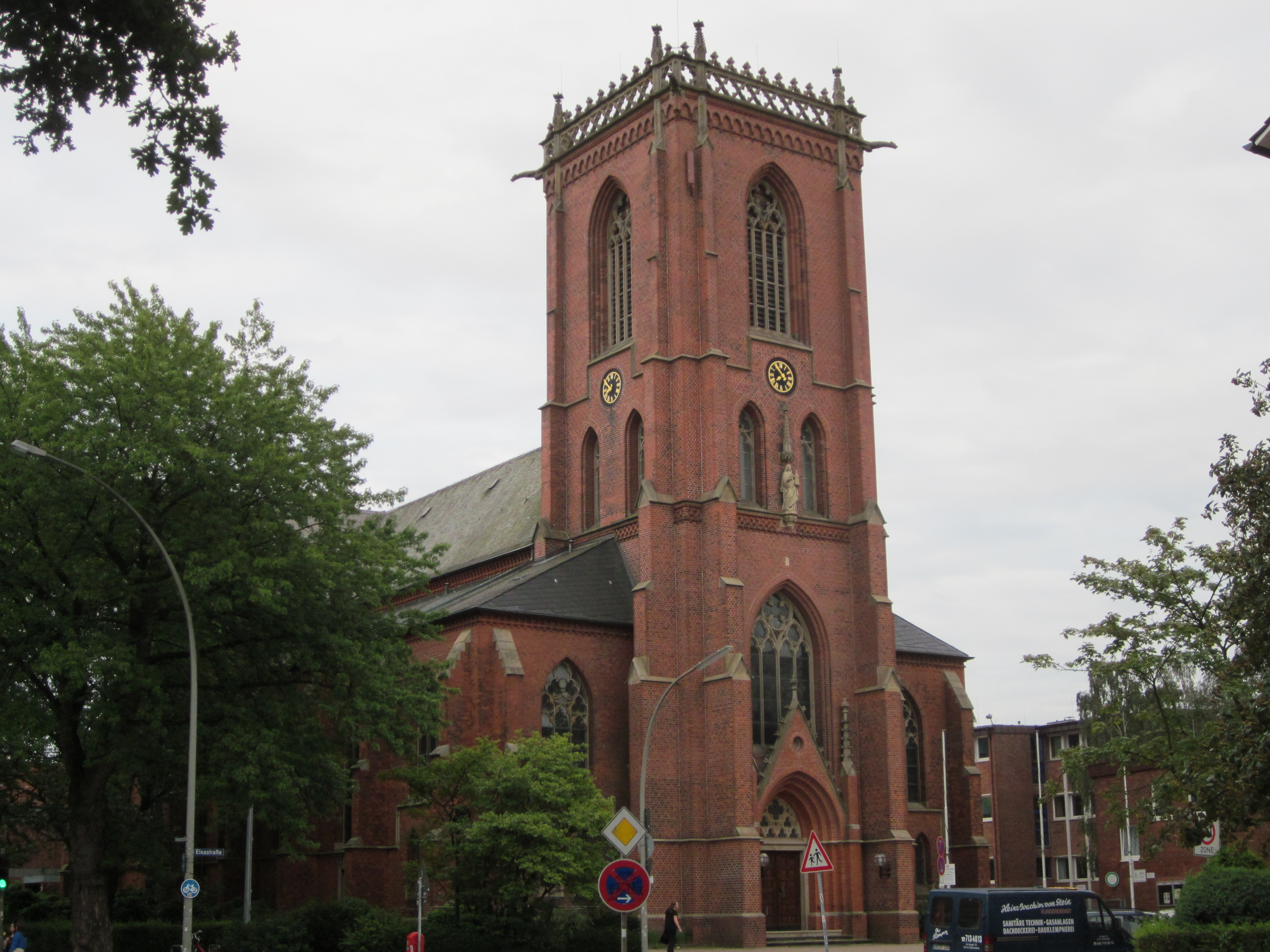 Die römisch-katholische St.-Sophien-Kirche in der Elsastraße in Barmbek-Süd wurde 1900 nach Plänen von Heinrich Beumer errichtet. Gestiftet wurde die Kirche von Wilhelm Anton Riedemann, dem Gründer der Deutsch-Amerikanischen Petroleum Gesellschaft. Die Kirche steht seit dem 15. Dezember 1992 unter Denkmalschutz. This is a photograph of an architectural monument.